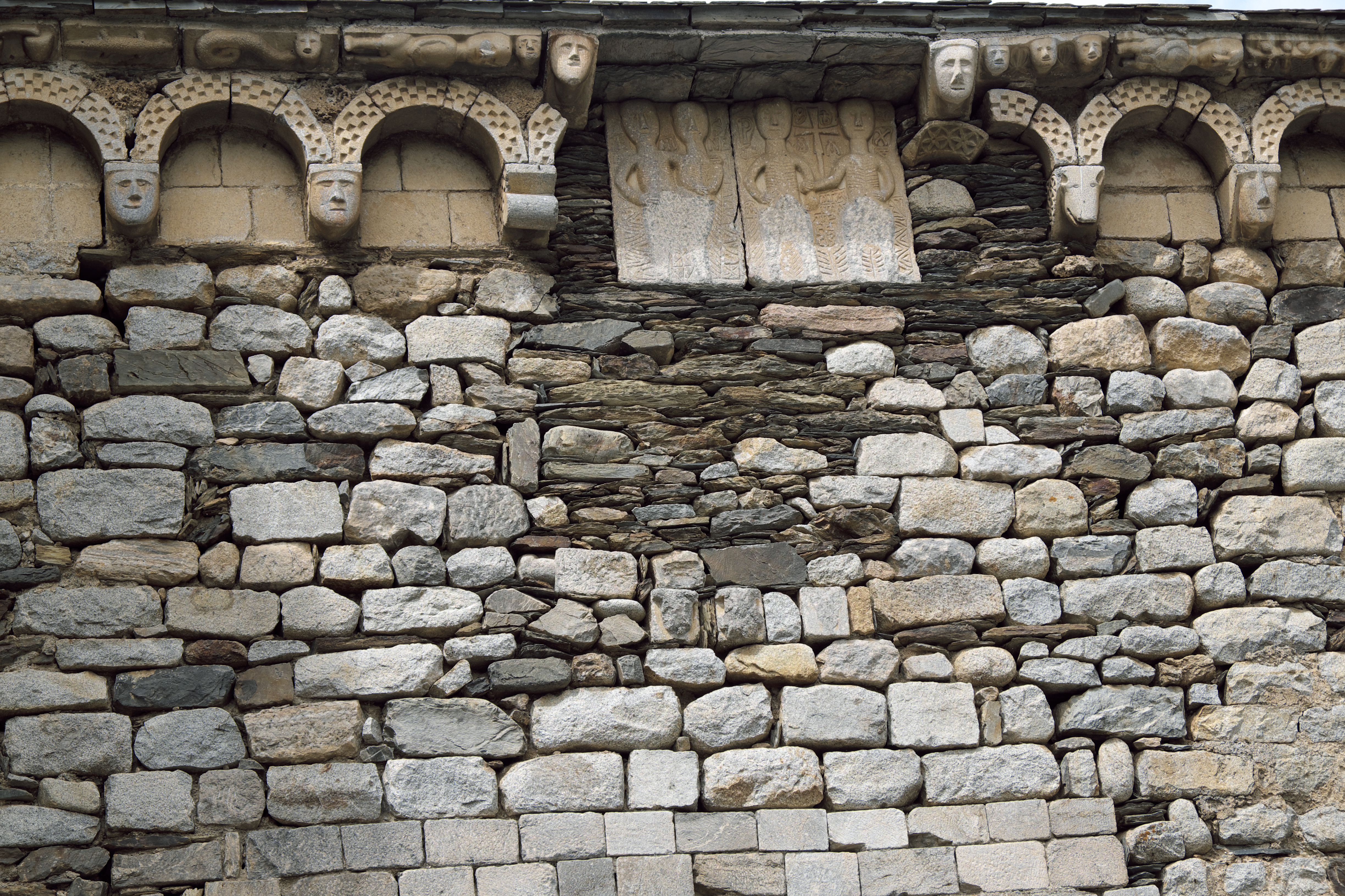 Kirche San Juan in Isil in der Provinz Lerida in Katalonien (Spanien)